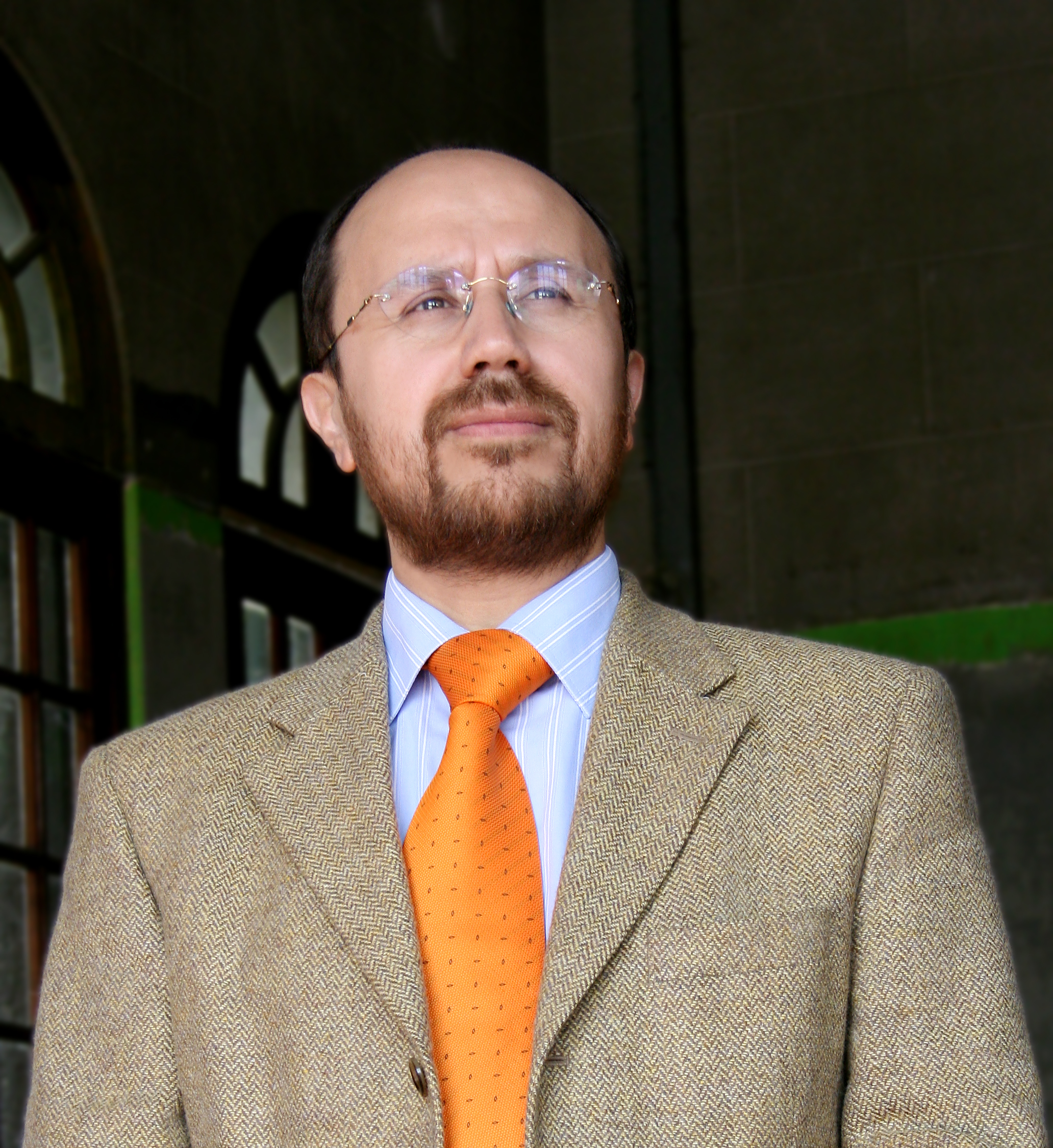 Retrato del profesor Gonzalo Leiva Quijada en 2016. Pontificia Universidad Católica de Chile